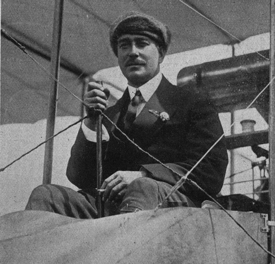 Bruno Büchner, deutscher Radrennfahrer und Pilot